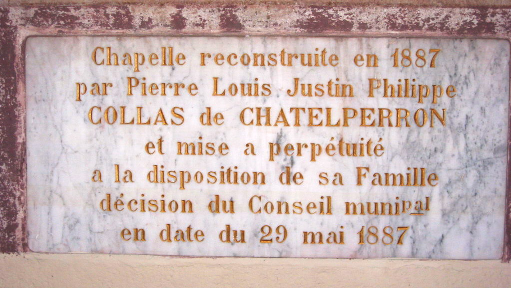 Châtelperron (France) - Église - Chapelle latérale nord